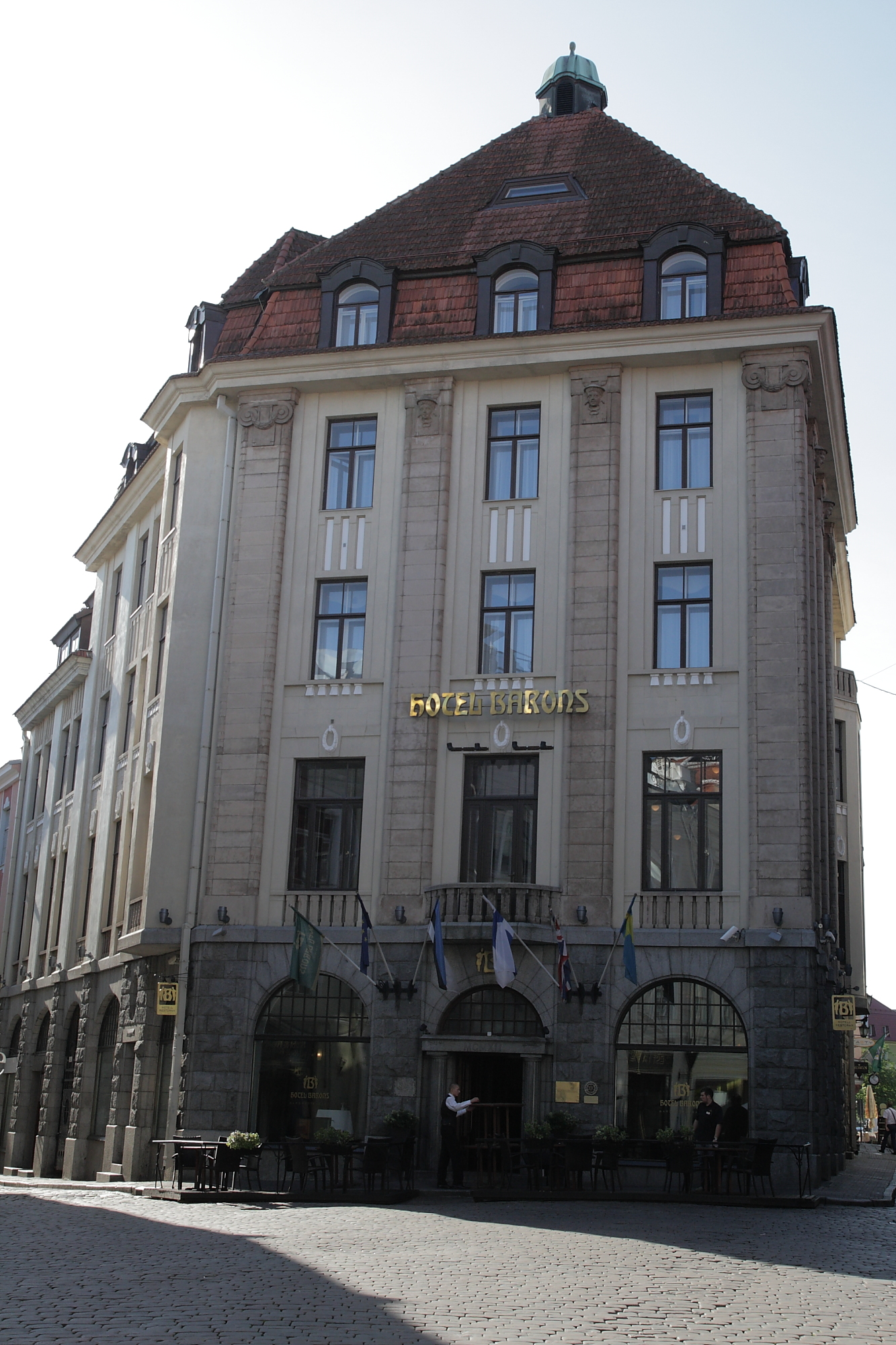 Tallinn, pangahoone Suur- Karja 7, 1912